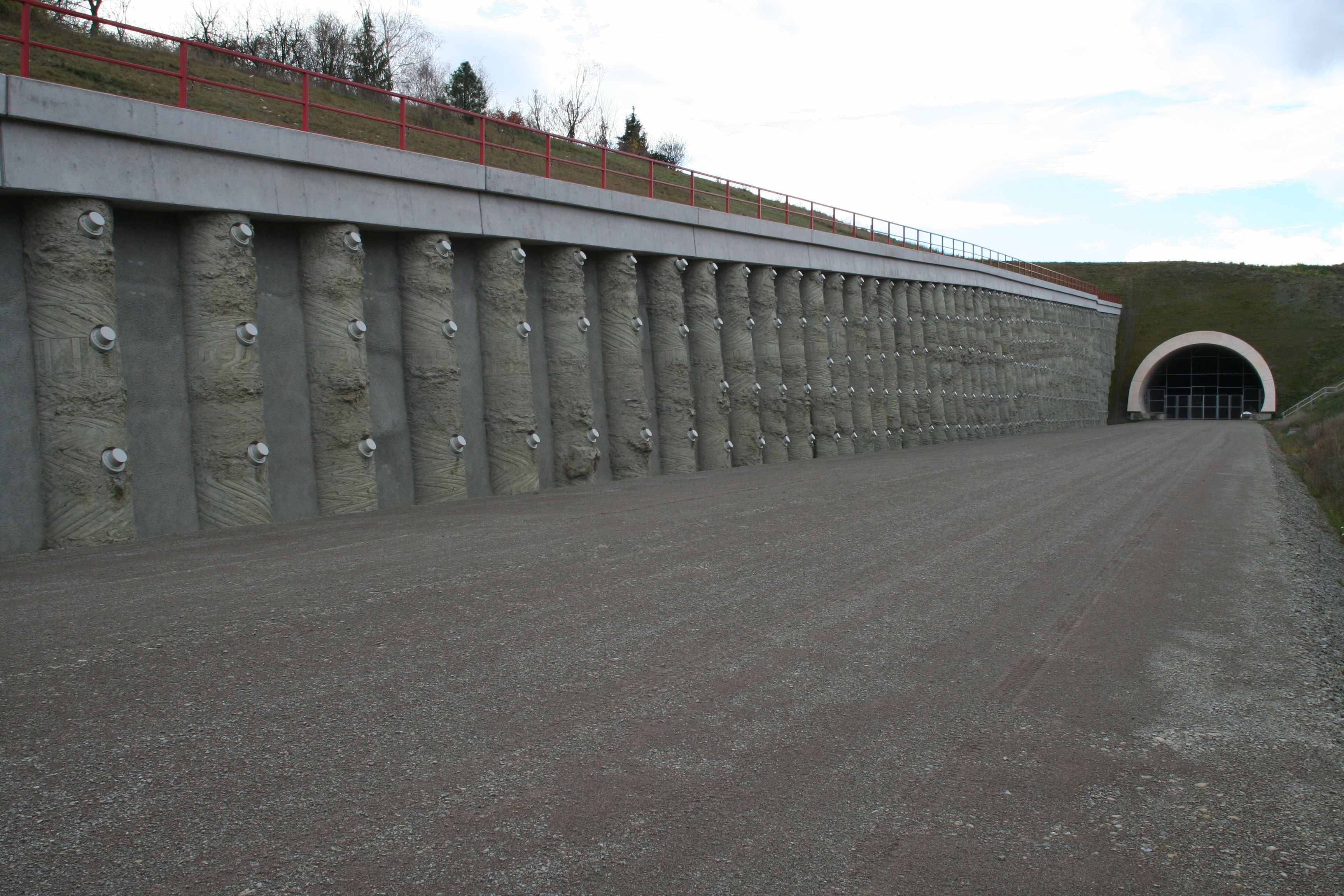 Tunnel Augustaburg, Ostportal bei Erfurt Bischleben